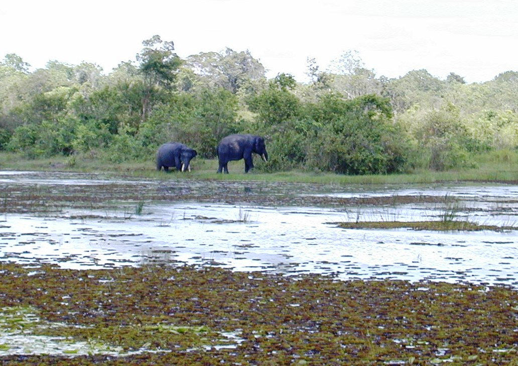 Elefanten Training Center